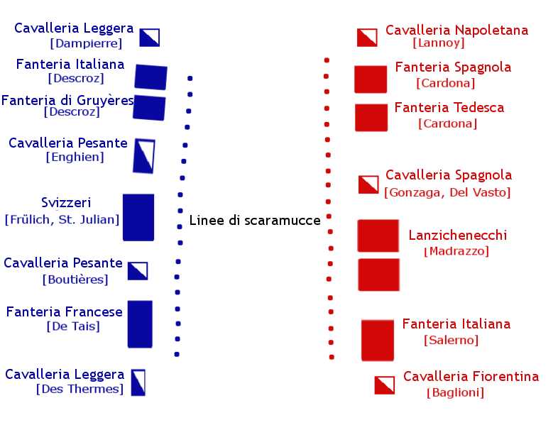 Disposizione iniziale delle truppe alla Battalglia di Ceresole; truppe Francesi in blu, truppe Imperiali in rosso.